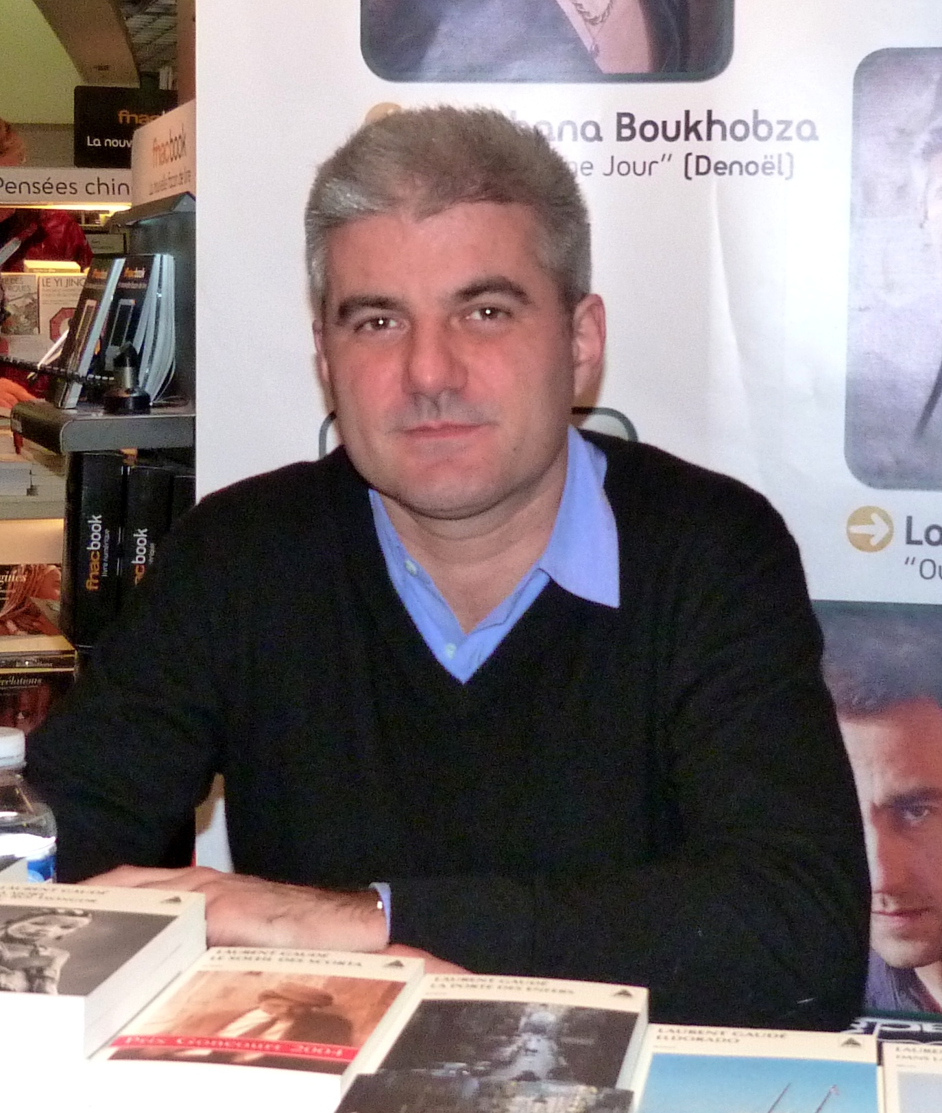 Laurent Gaudé, lors d'une signature à la FNAC Forum à Paris, pour son livre "Ouragan", le 26 novembre 2010.